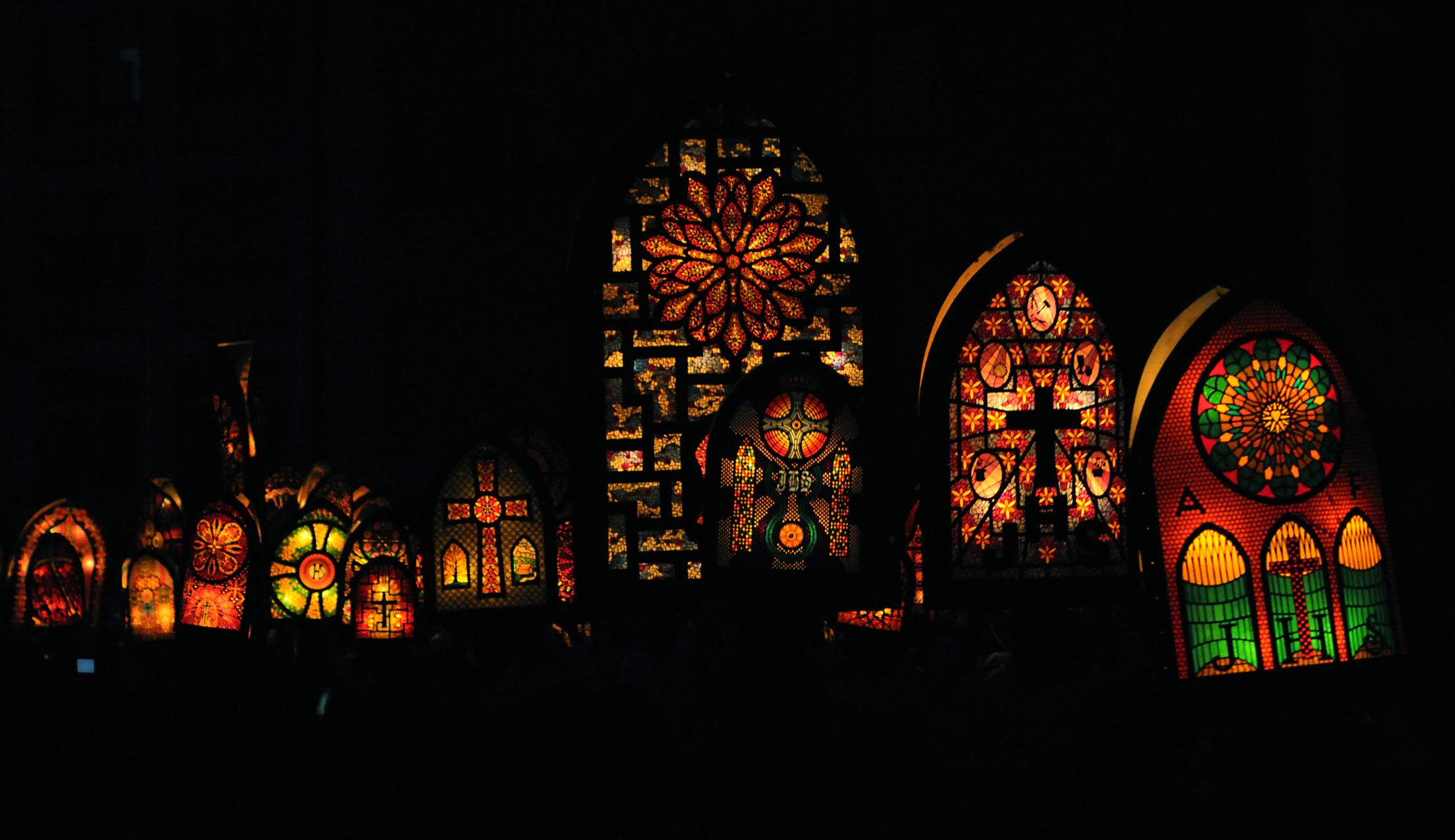 Chlausjagen 2011